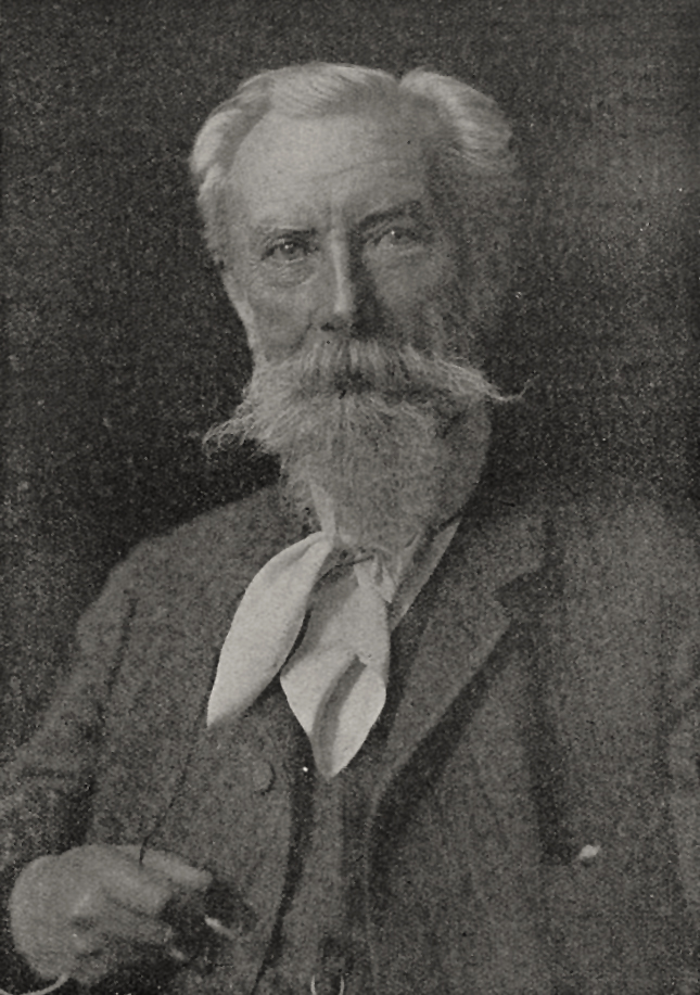 Christian Kröner, der bekannte Tiermaler, geb. am 3. Februar 1838 zu Rinteln, ist in Düsseldorf in der Nacht zum 16. Oktober gestorben, Foto C. Luck, 1911